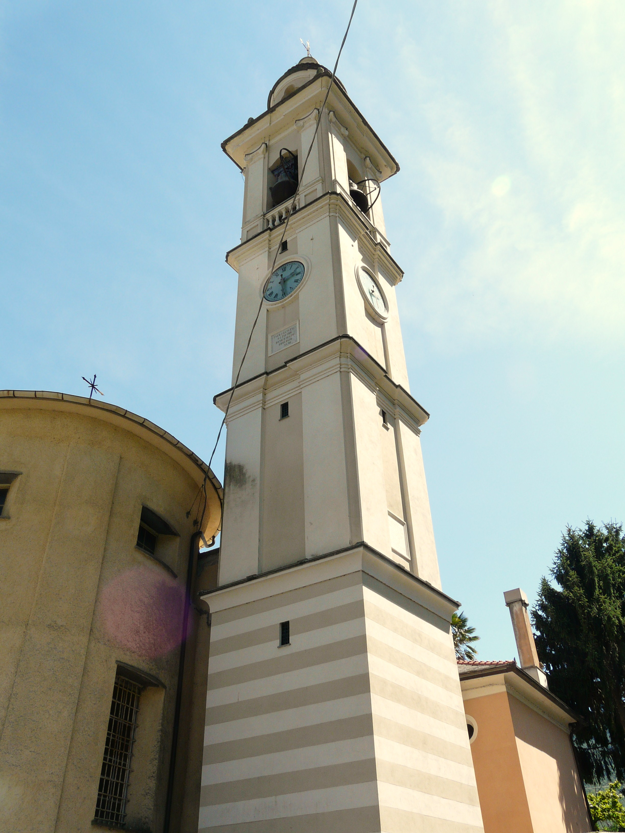 Campanile della Chiesa di San Martino, Garbarini, Tribogna, Liguria, Italia